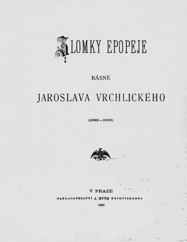 Zlomky epopeje, básnická sbírka Jaroslava Vrchlického